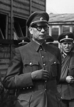 Title: Dabendorf, Generale Trochin und Wlassow Extra information: Lager Dabendorf (südlich von Berlin).- General Wlassow (2. v.l.), Oberbefehlshaber der ROA auch Wlassow-Armee genannt, im Kreise von Offizieren (l. General Trochin). People in the image: Wlassow, Andrej Andrejewitsch: General, Komitee zur Befreiung der Völker Rußlands, am 1.8.1946 in Moskau hingerichtet, Sowjetunion Factual corrections and alternative descriptions are encouraged separately from the original description. Additionally errors can be reported at this page to inform the Bundesarchiv. Original historic description: General Wlassow im Kreise von Offizieren.